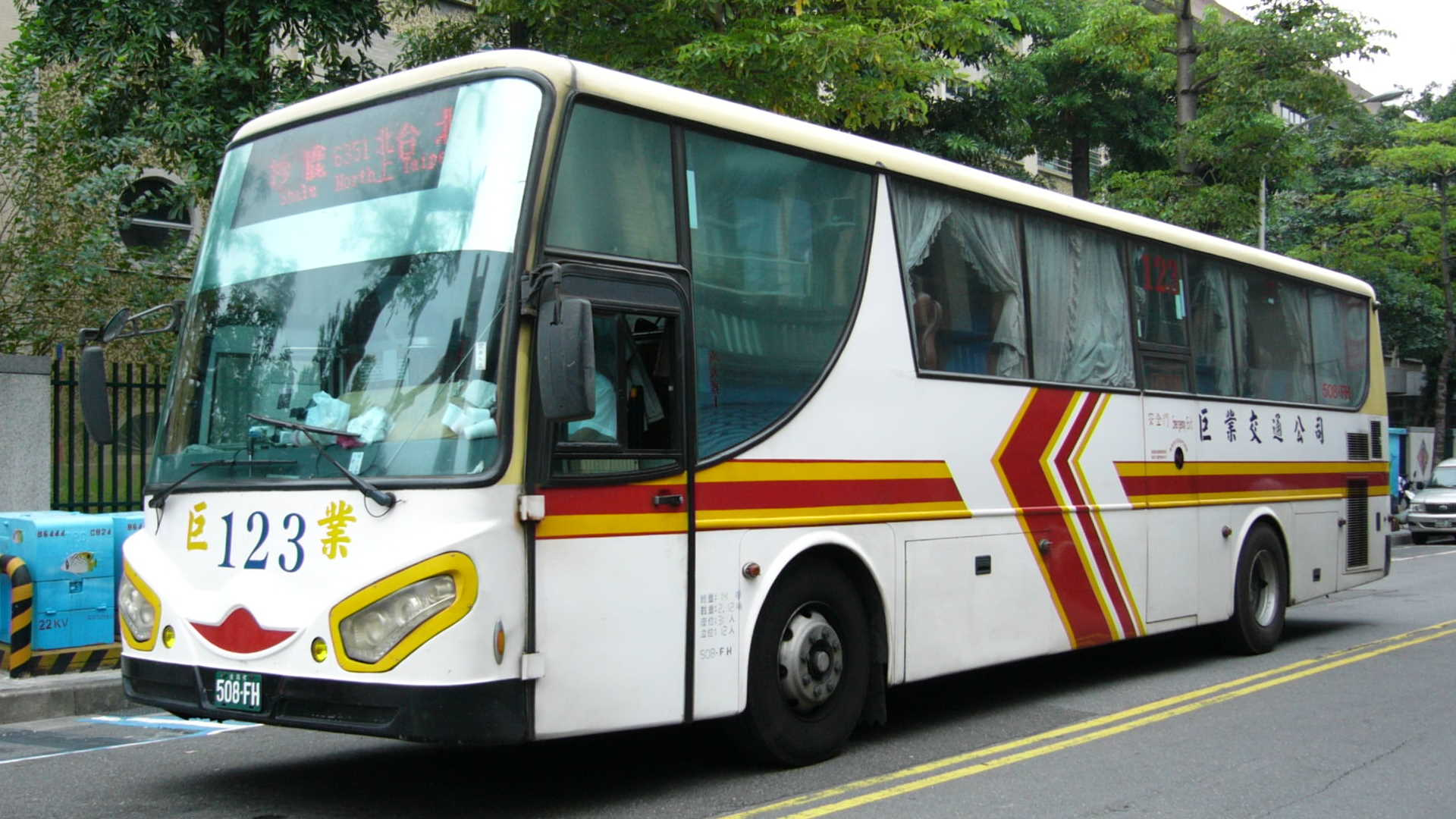 中文（台灣）: 巨業交通國道客運用Fuso RM117NL大客車508-FH左前方外觀。